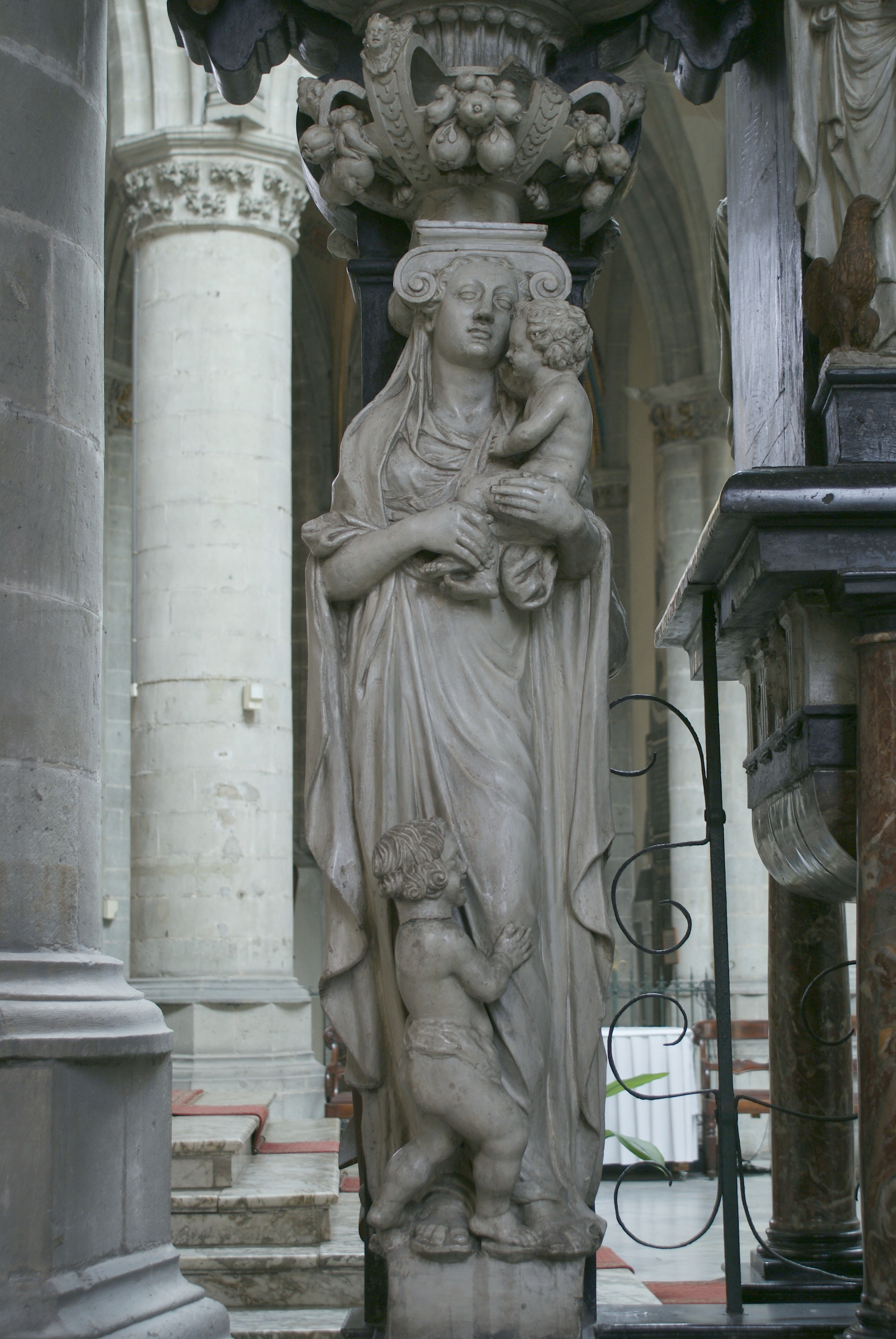 Sint-Martinuskerk (Aalst) - Sacramentstoren Jeroom Duquesnoy (detail)